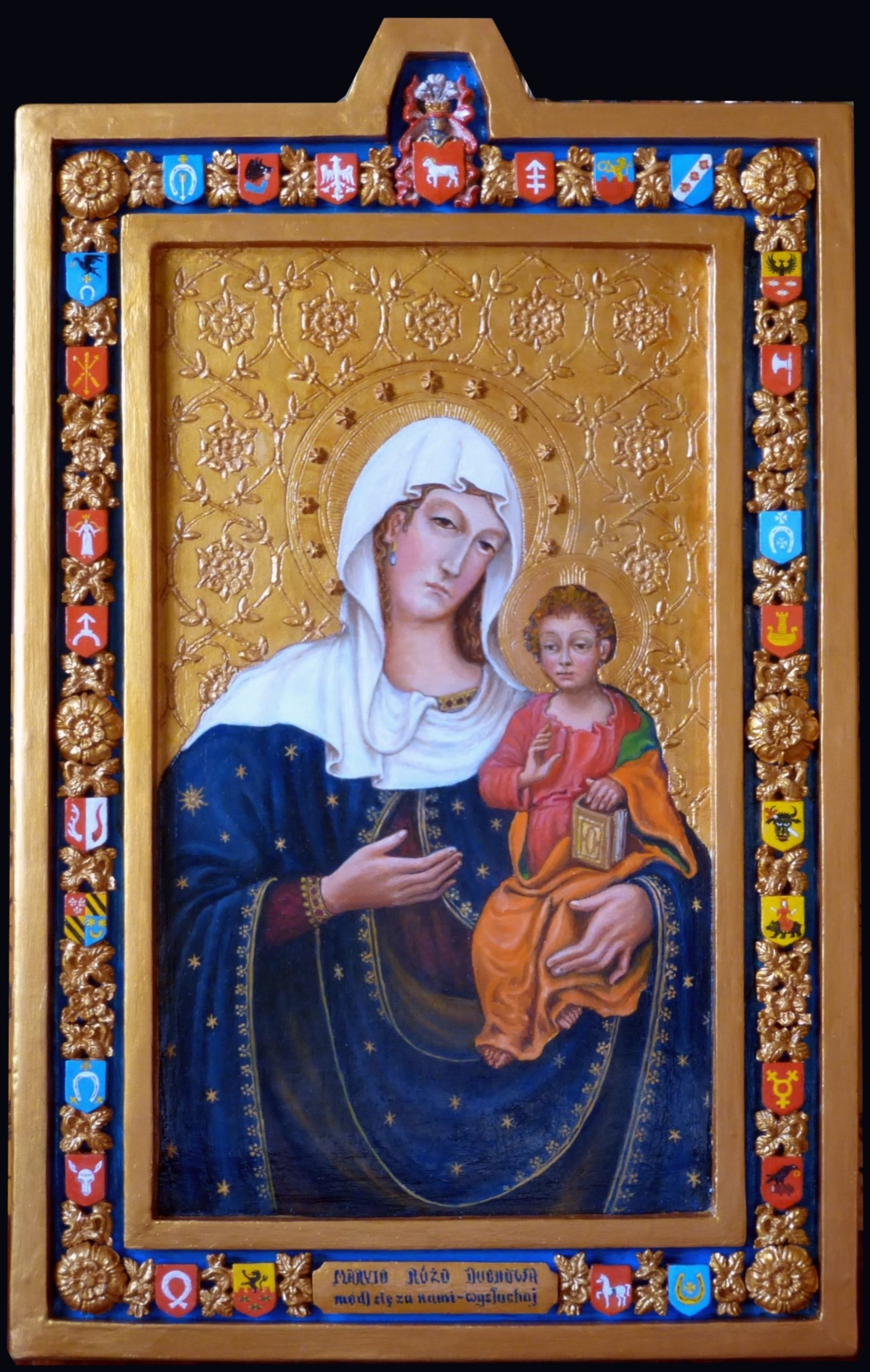 obraz Matki Boskiej "Róży Duchowej" z kościoła p.w. św. Józefa w Rościszewie